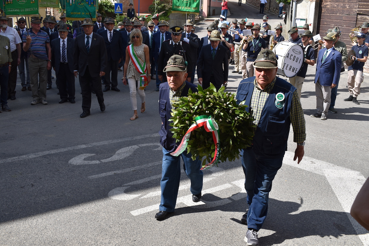 Commemoraz caduti in guerra Montaldo B.da